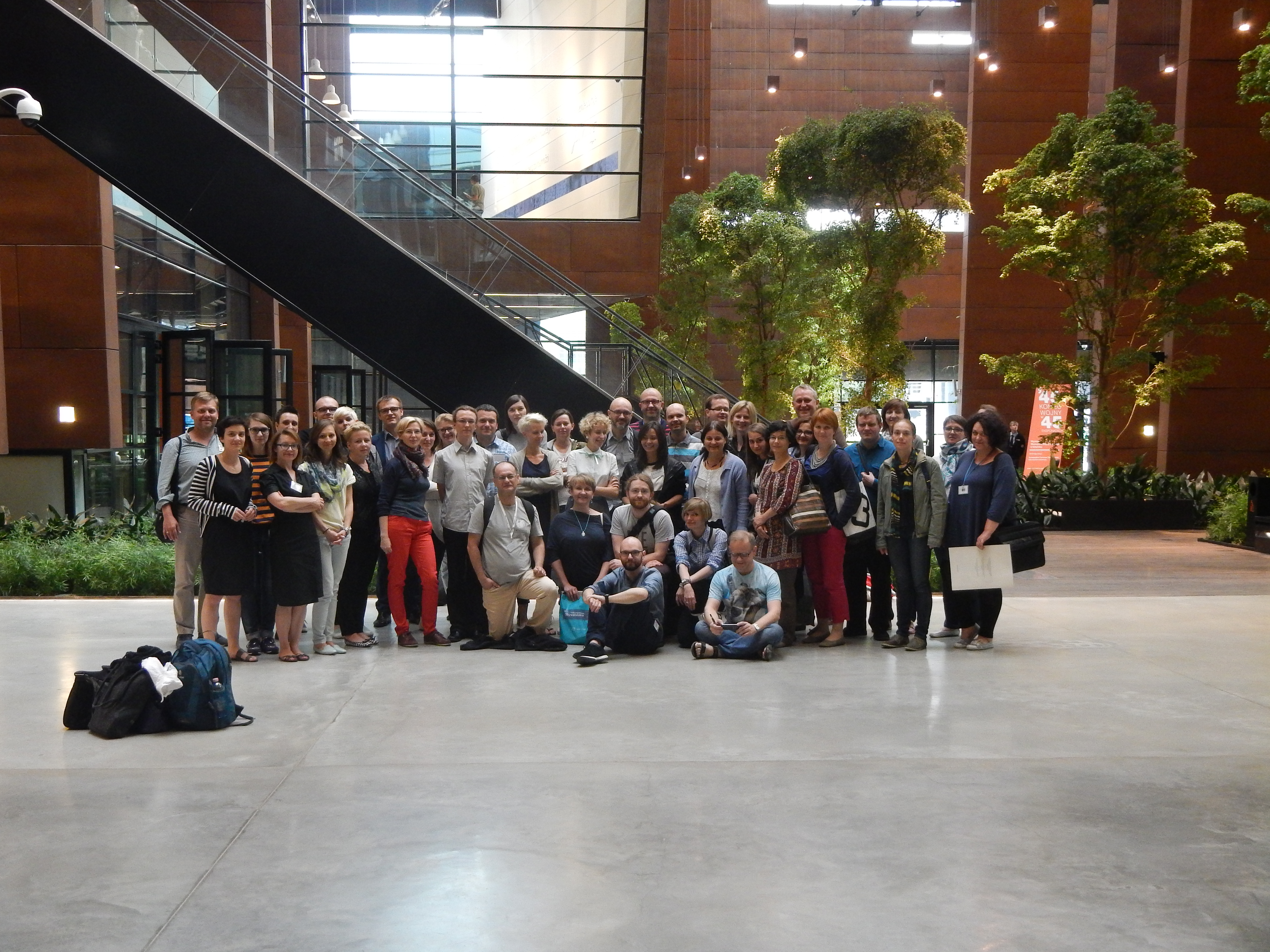 Zdjęcia wykonane podczas zjazdu Koalicji Otwartej Edukacji w Gdańsku 29 czerwca w Europejskim Centrum Solodarności